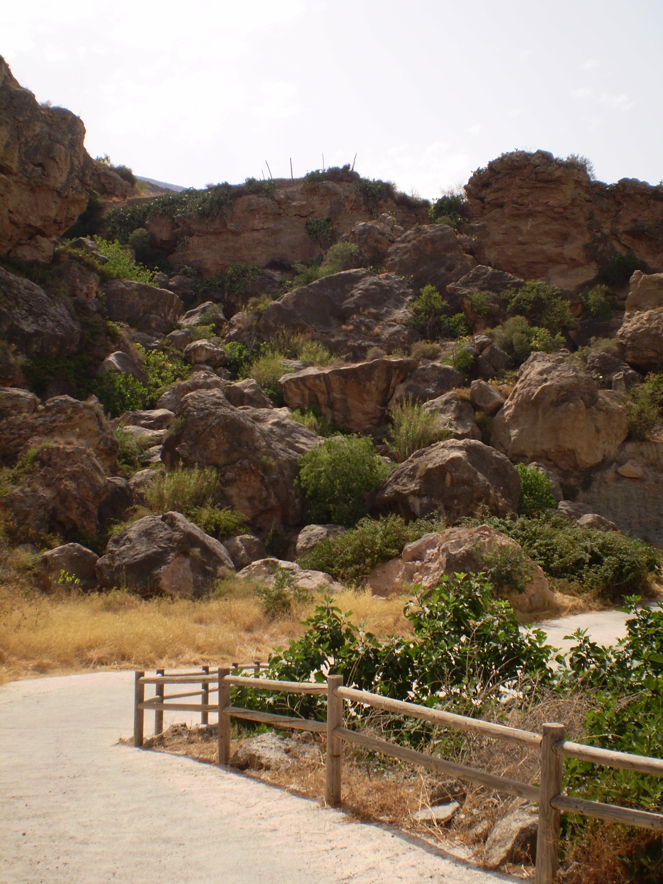 Alfarax (Huécija -Almería)